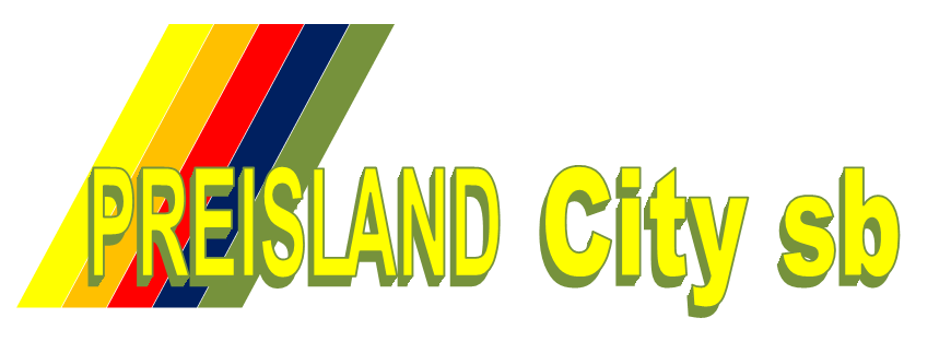 Logo Preisland City sb um 1975